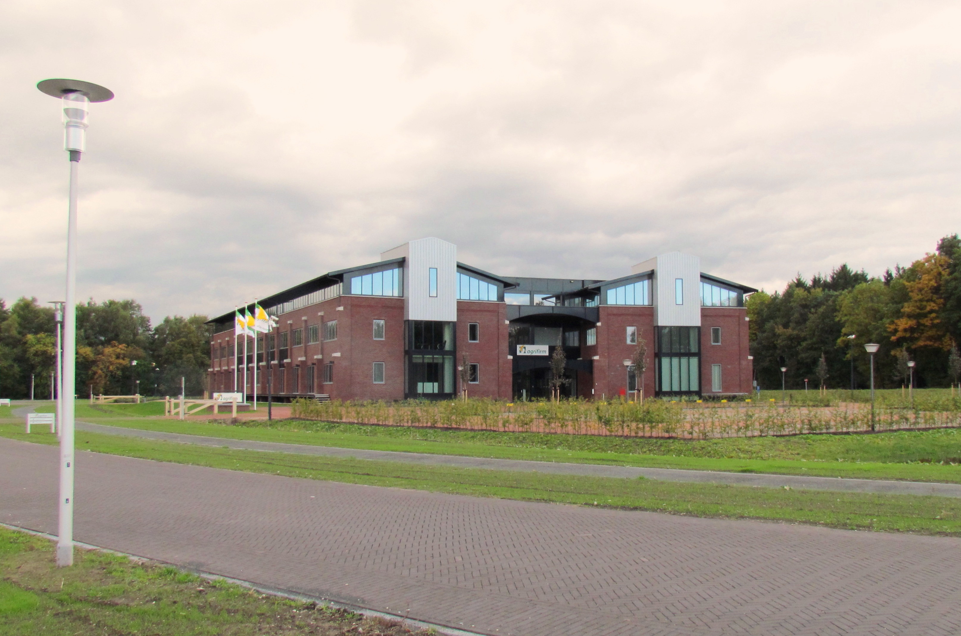 Hoofdkantoor van Agrifirm, Nederlandse land- en tuinbouwcoöperatie, te Apeldoorn (geopend september 2012)